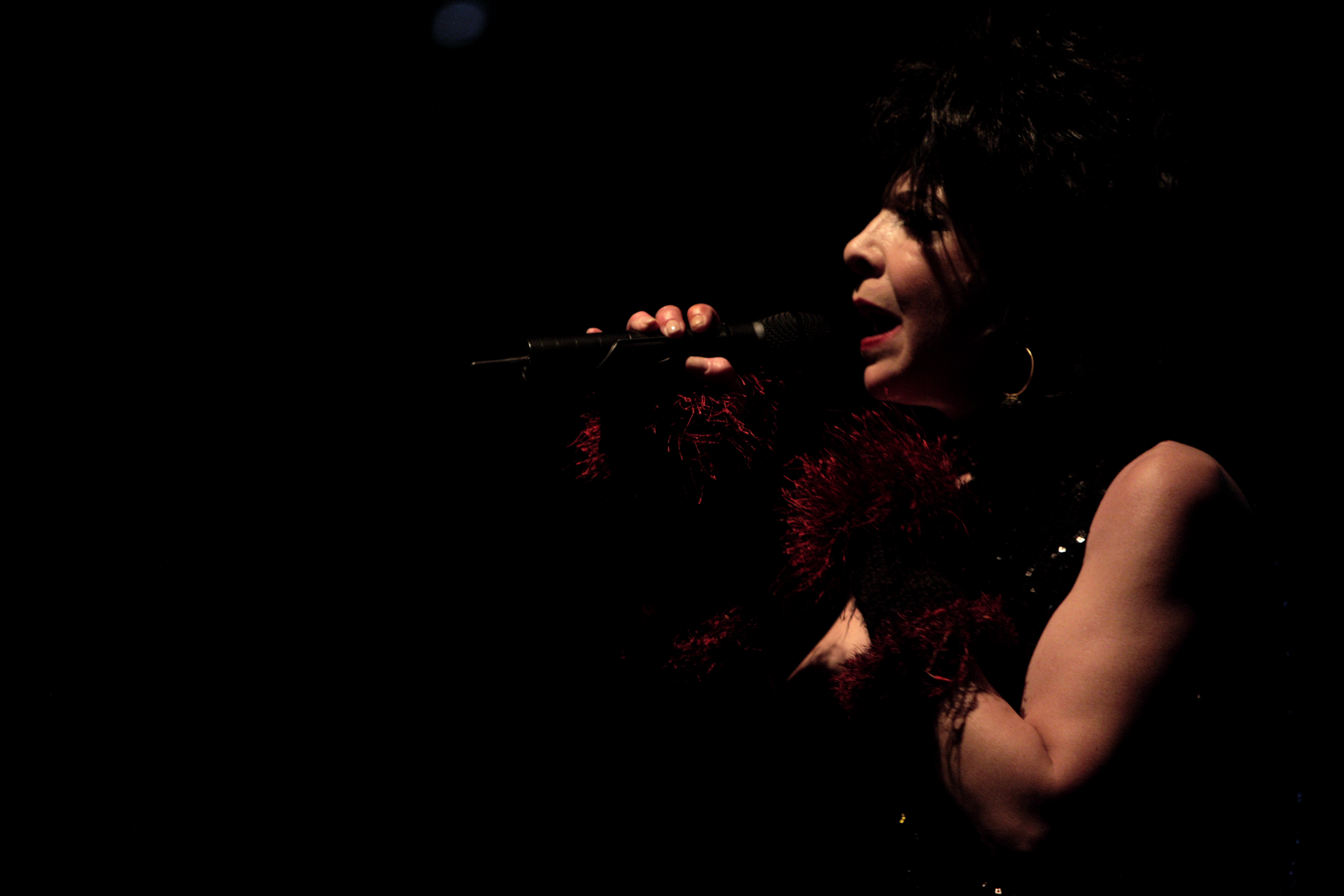 Julee Cruise 2008 at La Route du Rock